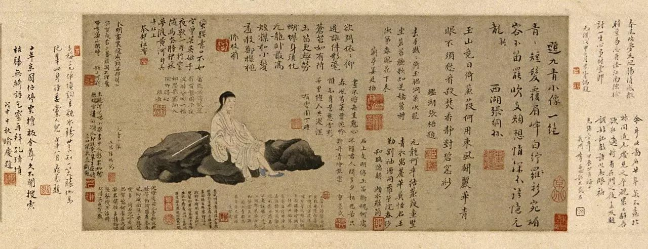 畫中人物為徐紫雲（1644－1675）字九青，號曼殊，為如皋冒氏家歌僮，色藝雙絕，和陳維崧相戀。此畫約作於康熙三年（1664）陳維崧離別水繪園、與徐紫雲分離之際，此卷作為懷袖長物，可緩解相思之苦，維崧時時出示，與友人共賞，卷後同時代題跋者多達75人，題詩161首、詞1闕。